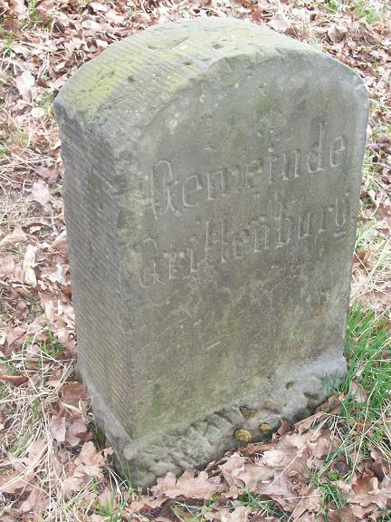 Ortstafel Grillenburg